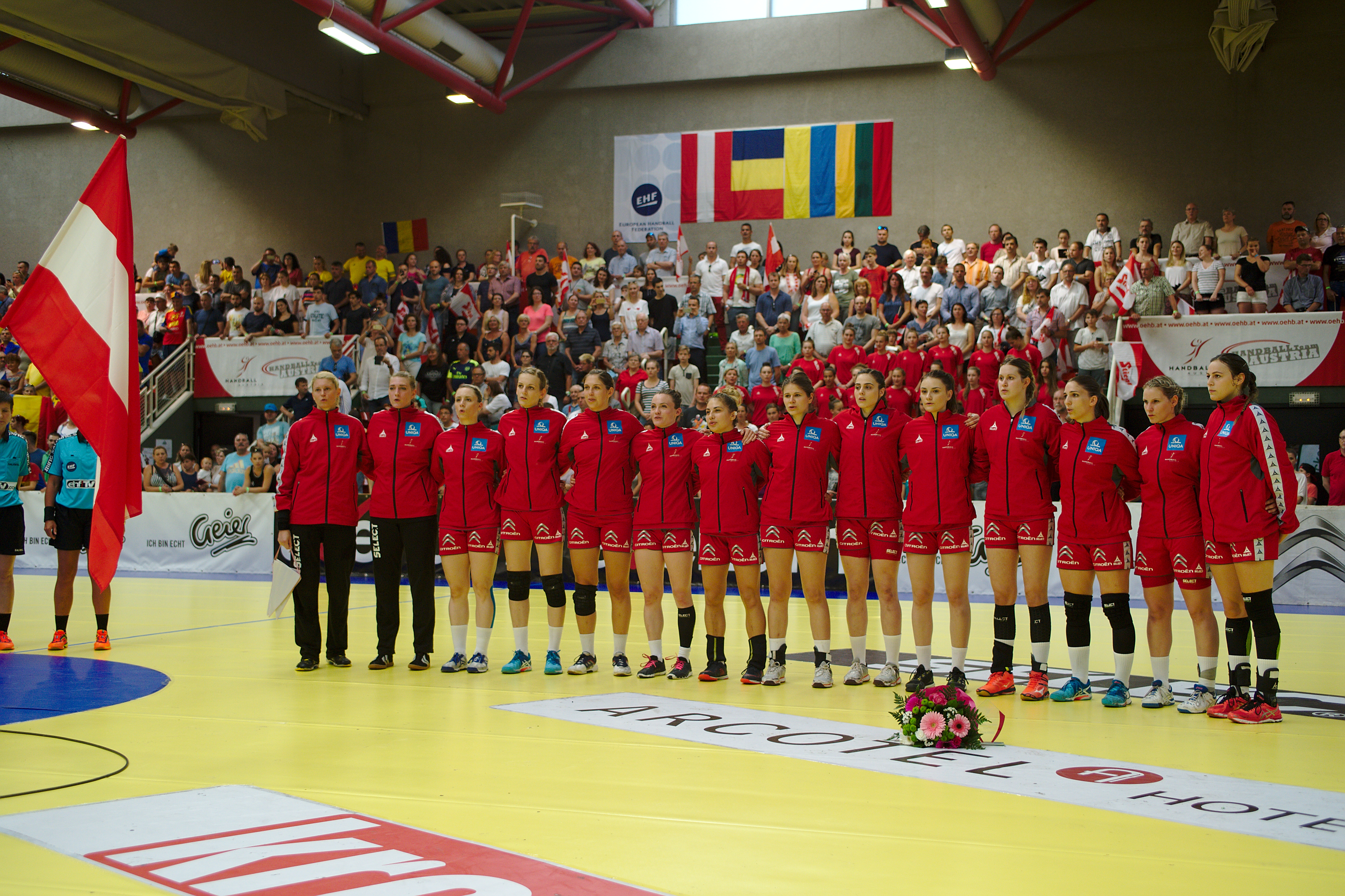 Damen-Handball WM-Qualifikation 13.06.2017: Nationalteam Österreich